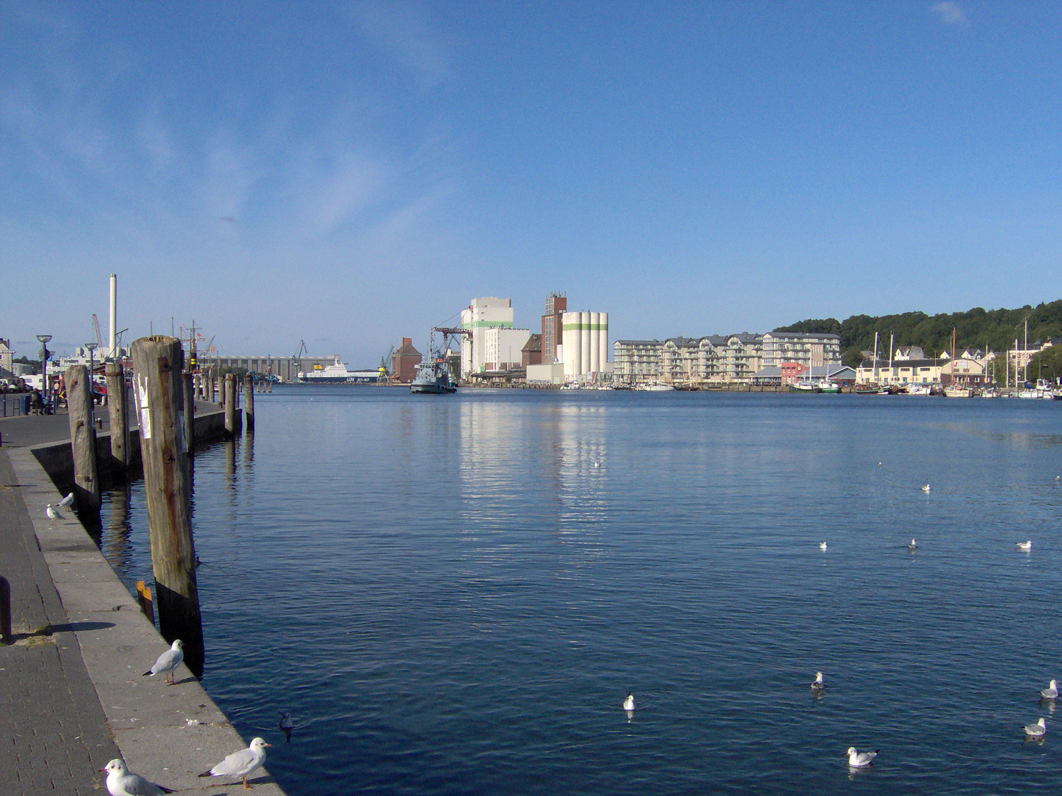 Blick auf die Flensburger Innenförde (auch: "Hafen") Richtung FSG und Speicherhafen